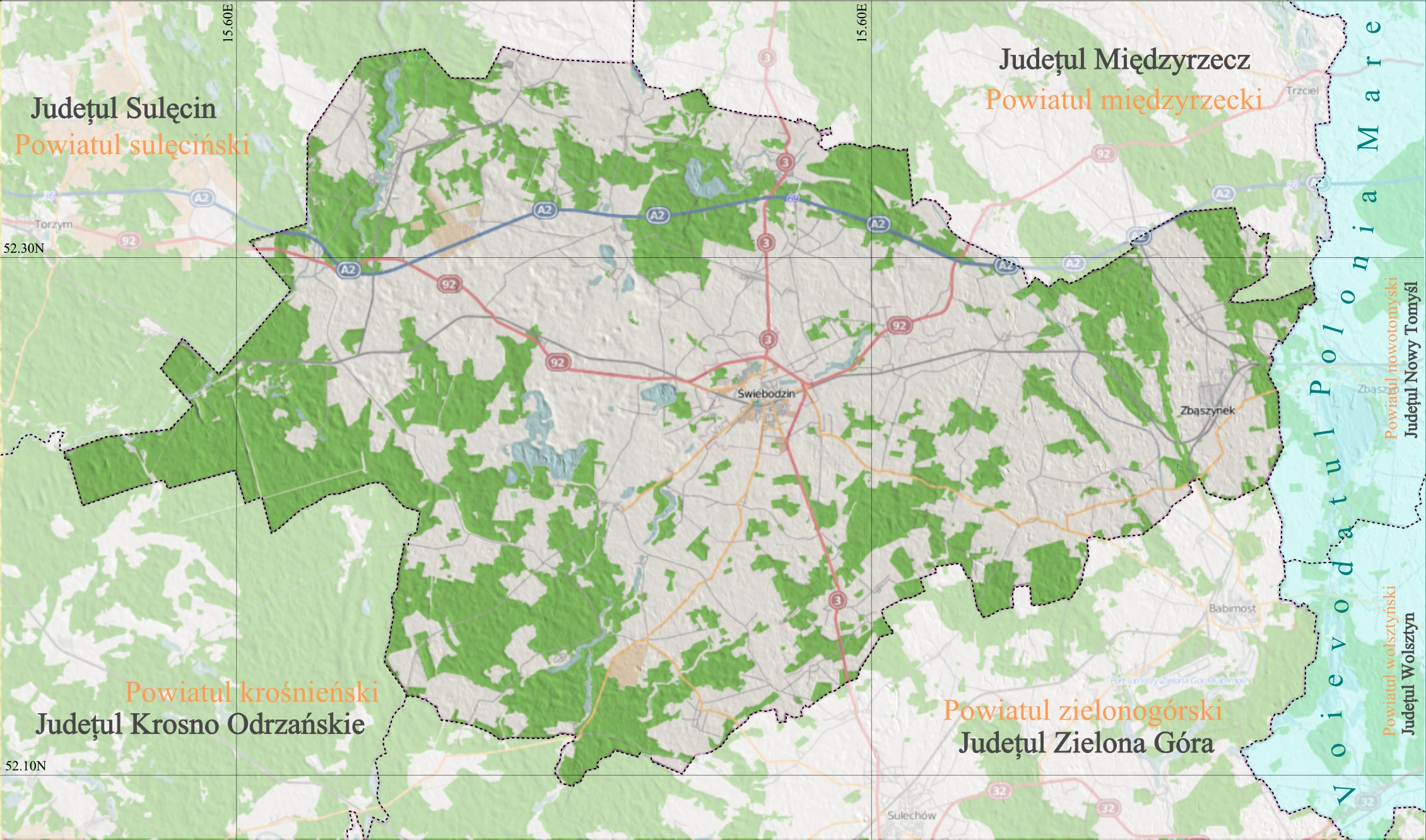 Harta de localizare a Judeţului Swiebodzin din Voievodatul Poloniei, Lubusz. Coordonate: Top: 52.04 Bottom: 52.075 Left: 15.05 Right: 15.95